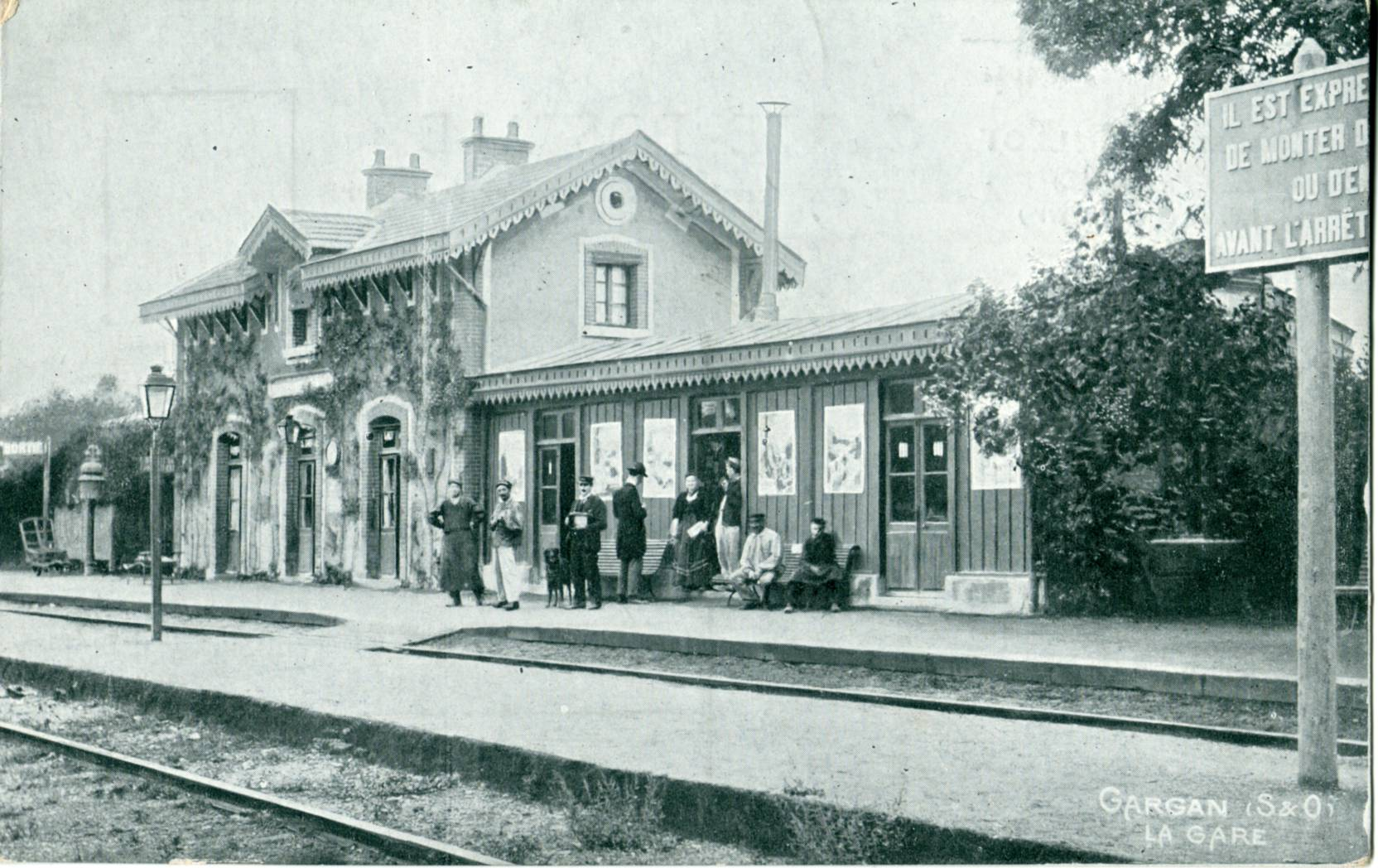 Carte postale cadeau éditée par la Grande manufacture française des chaussures Pillot à ParisGARGAN : La GareIl s'agit de la première gare de gargan, construite en 1875